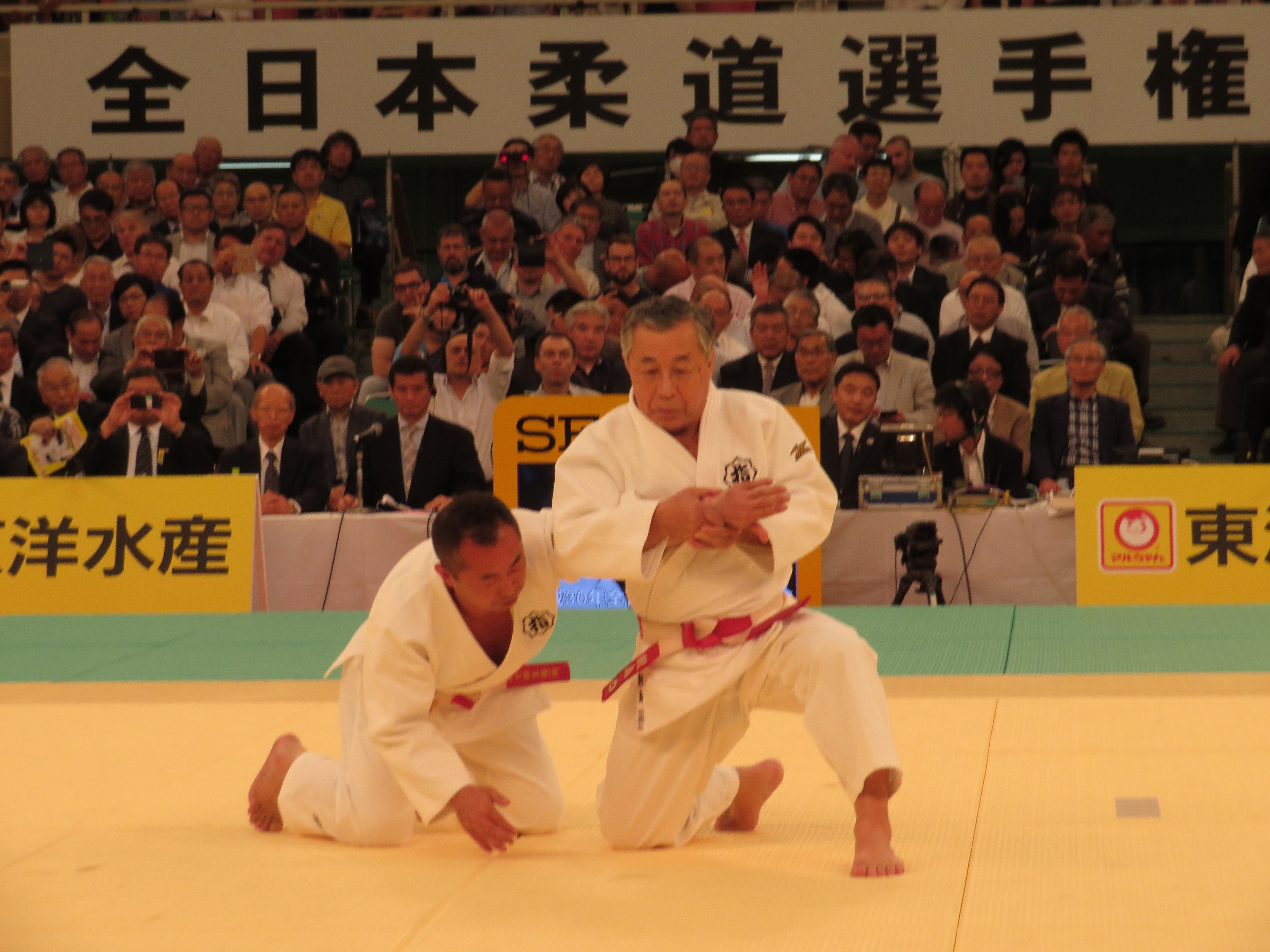 座った位置で攻撃された場合